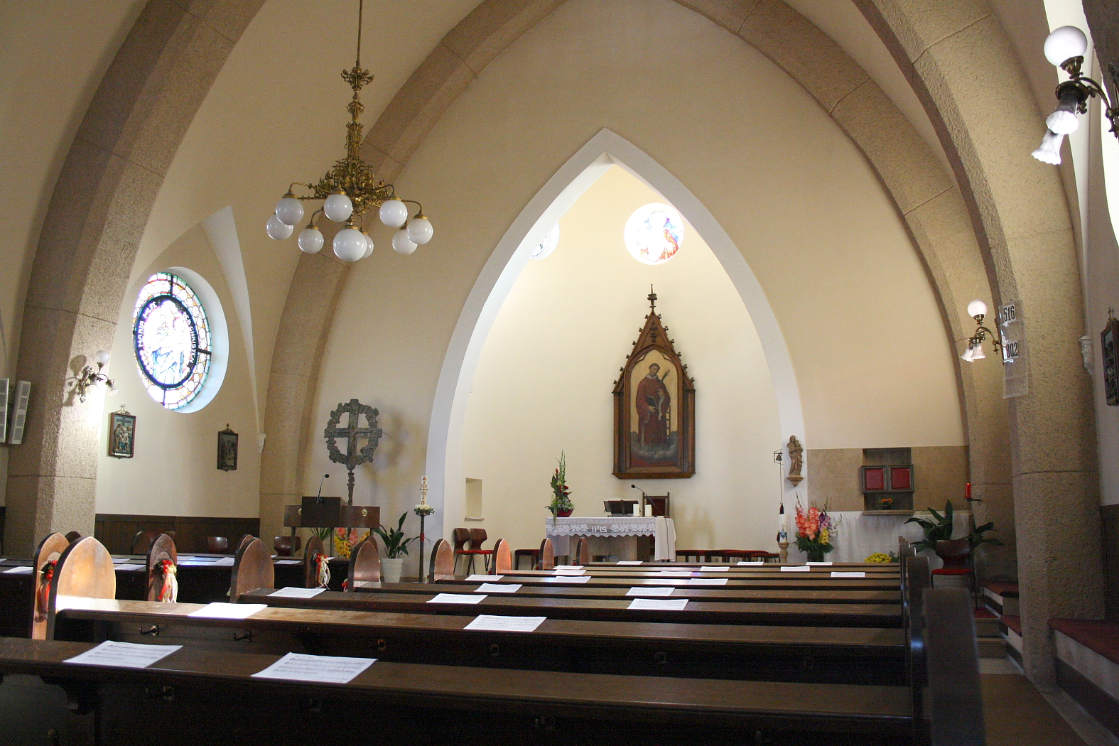 Innenansicht der Pfarrkirche von Gablitz, Niederösterreich.